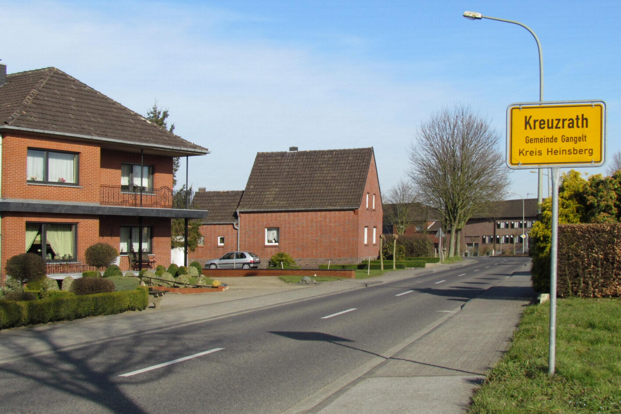 Ortseingang von Kreuzrath